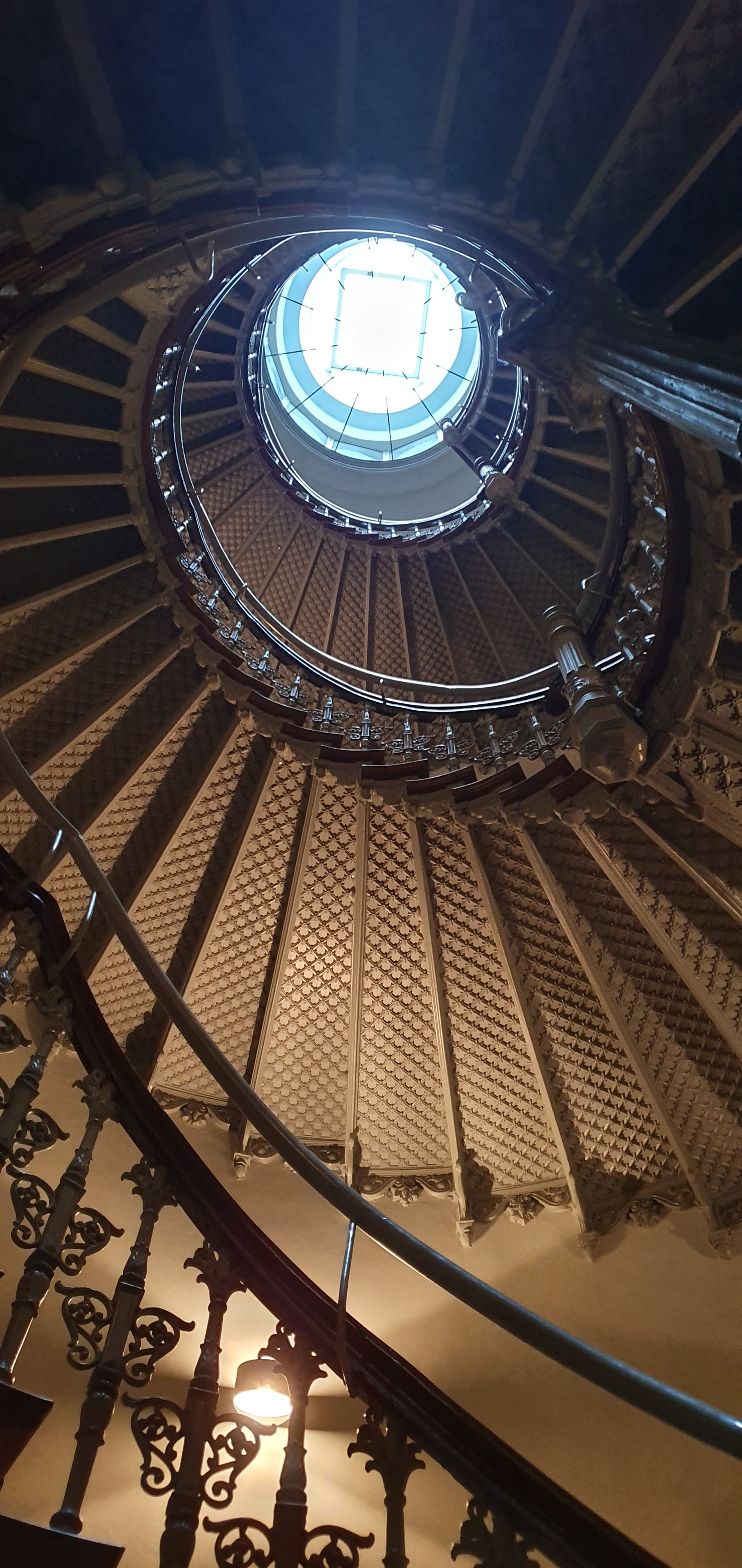 Klatka schodowa w Kamienica Sachsów we Wrocławiu